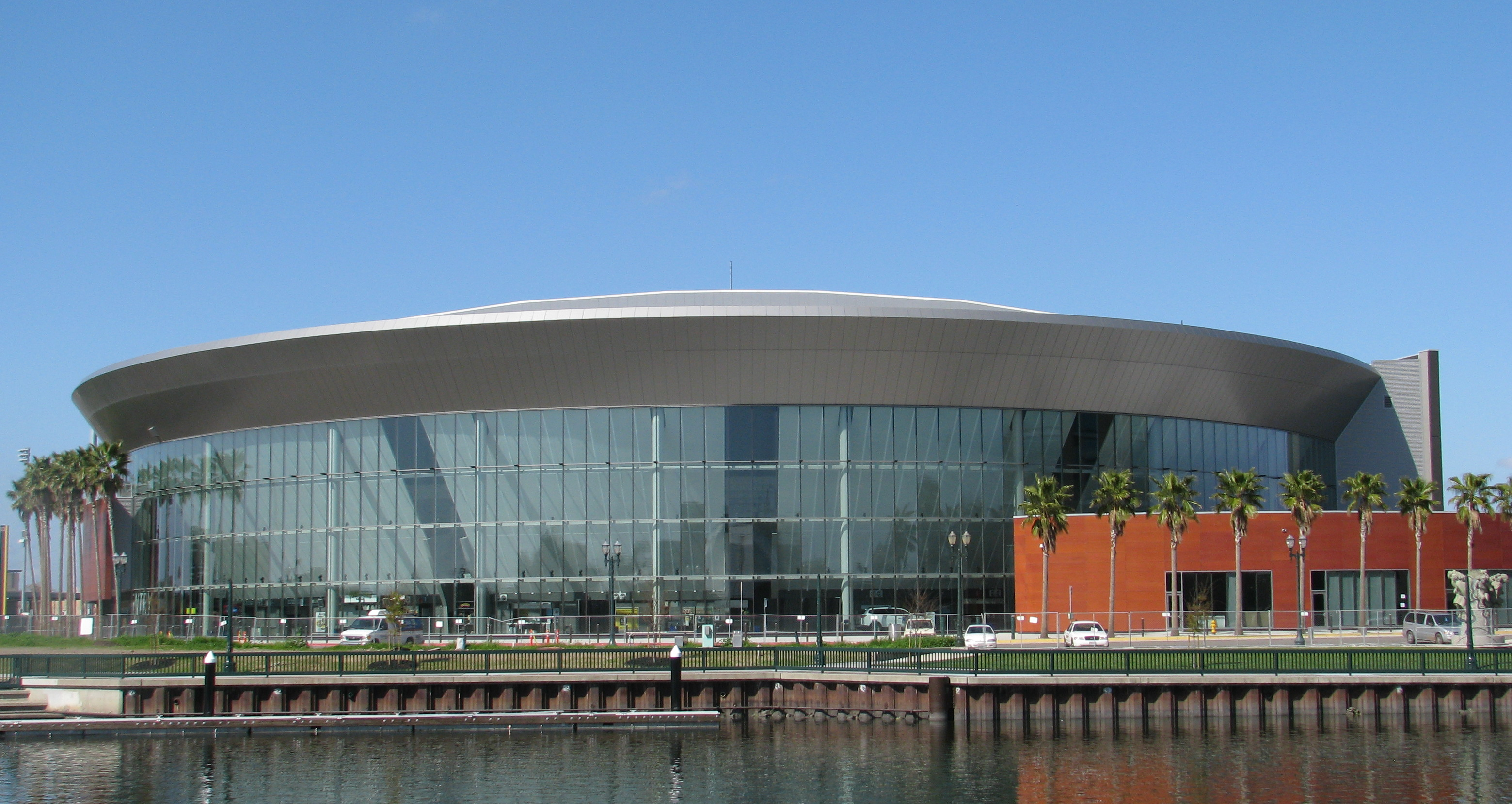 Arena, Sockton Ca.